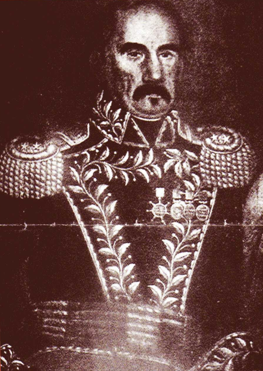 General Antonio Obando(1788-1849)